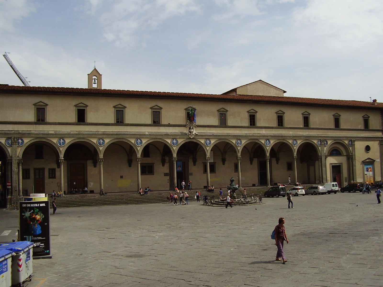 Ospedale degli Innocenti, outside view in Florence, Italy